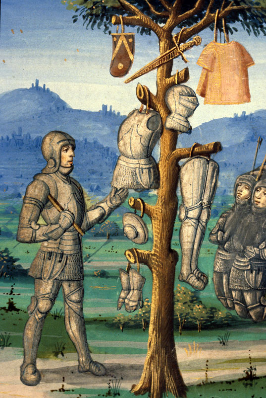 Virgile Dijon Ms 493 aux armes des Lallemant fol 193v detai